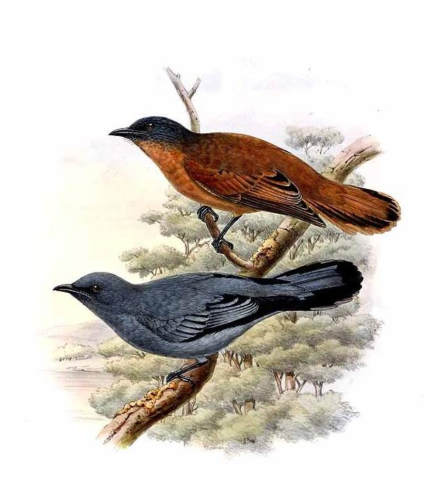 Échenilleur de Gray